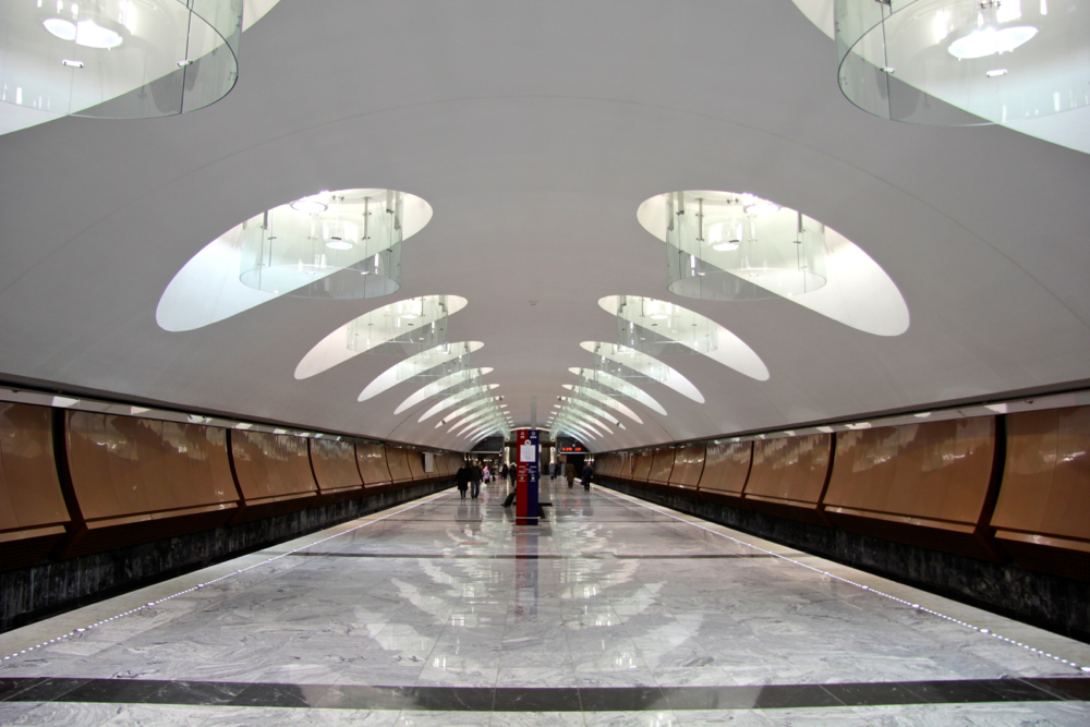 Lyublinsko-Dmitrovskaya Line (Люблинско-Дмитровская линия) Moscow Metro (Московский метрополитен) The movie about Borisovo, Shipilovskaya and Zyablikovo stations (Фильм о станциях Борисово, Шипиловская и Зябликово)